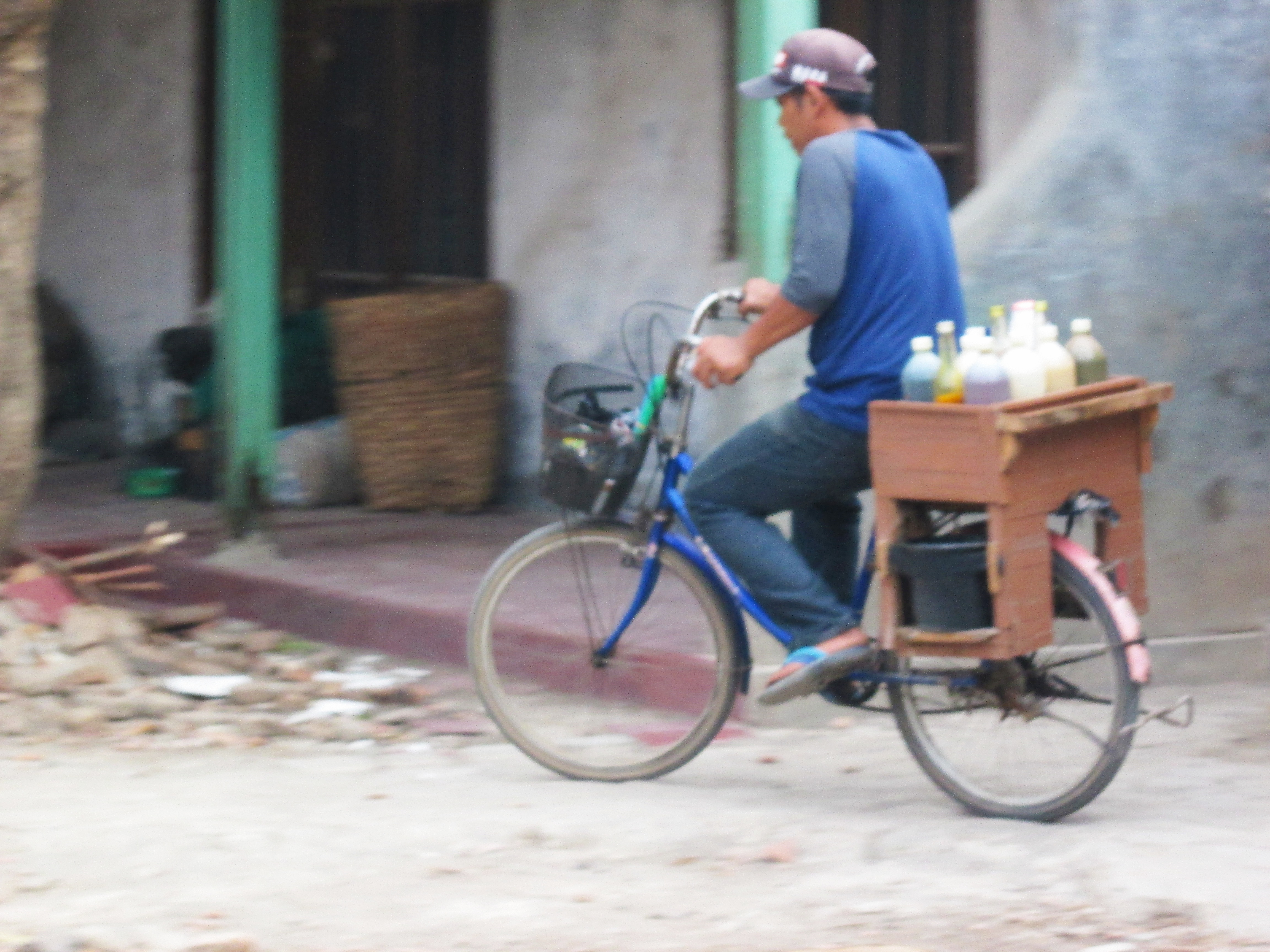 Jawa: ꦢꦺꦴꦭ꧀ꦢꦺꦴꦭꦤ꧀ ꦗꦩꦸ ꦠꦿꦢꦶꦱꦶꦪꦺꦴꦤꦭ꧀